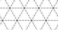 Het gelijkzijdig driehoekig stramien bij horizontale grondinjectie